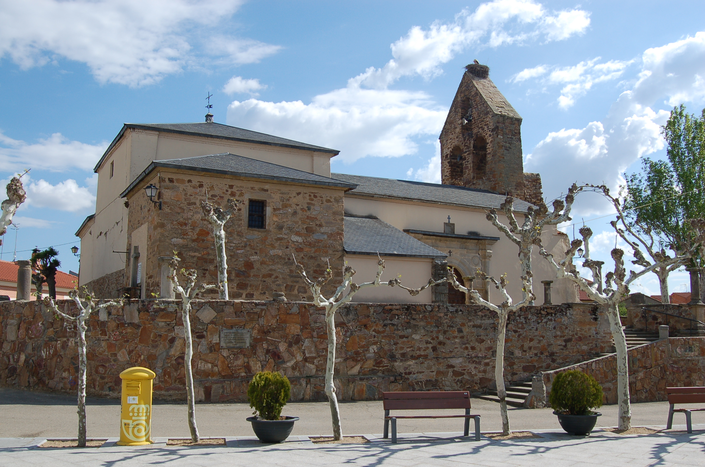 Igrexa de Burganes de Valverde